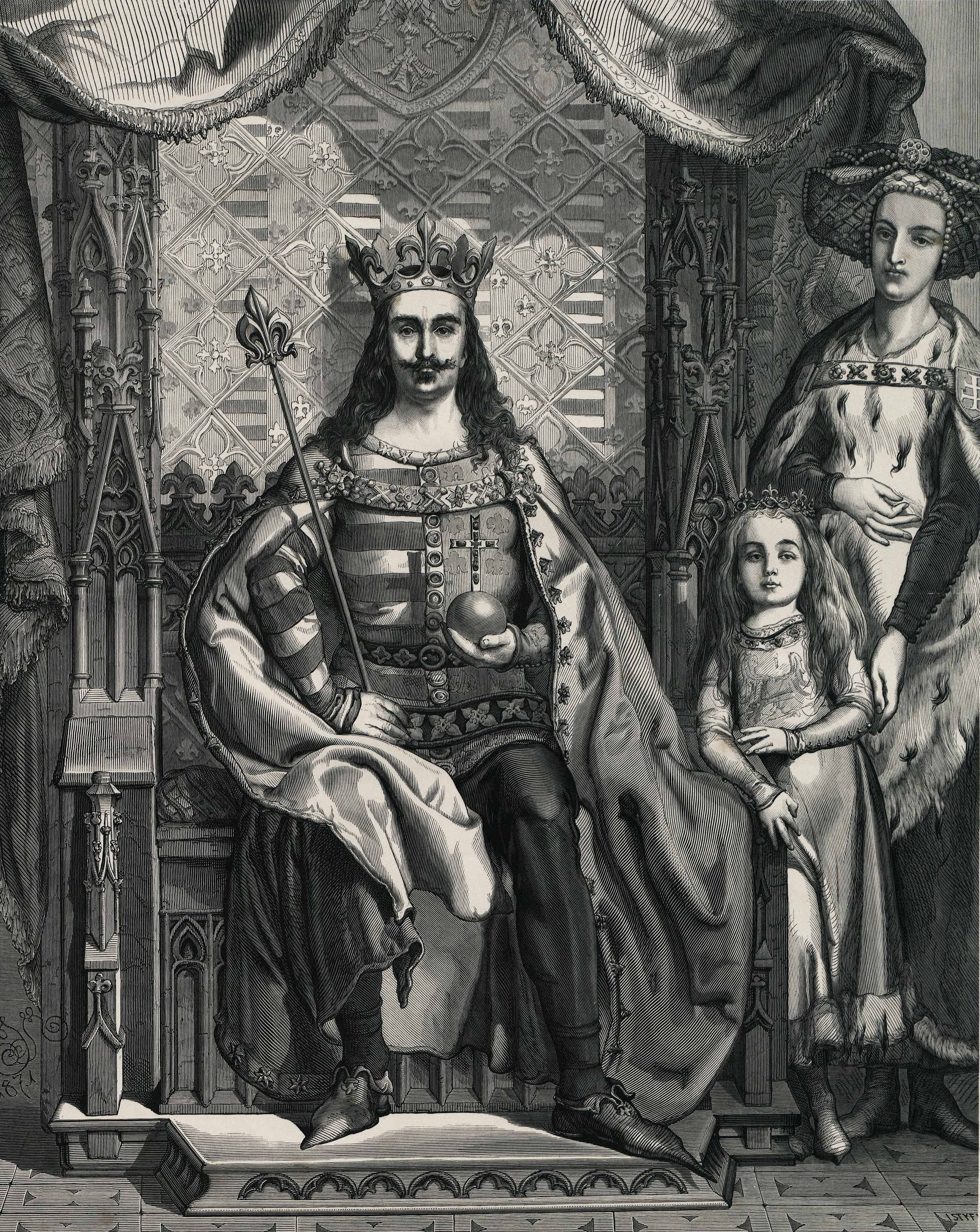 Ludwik Węgierski i Elżbieta Bośniaczka z córką